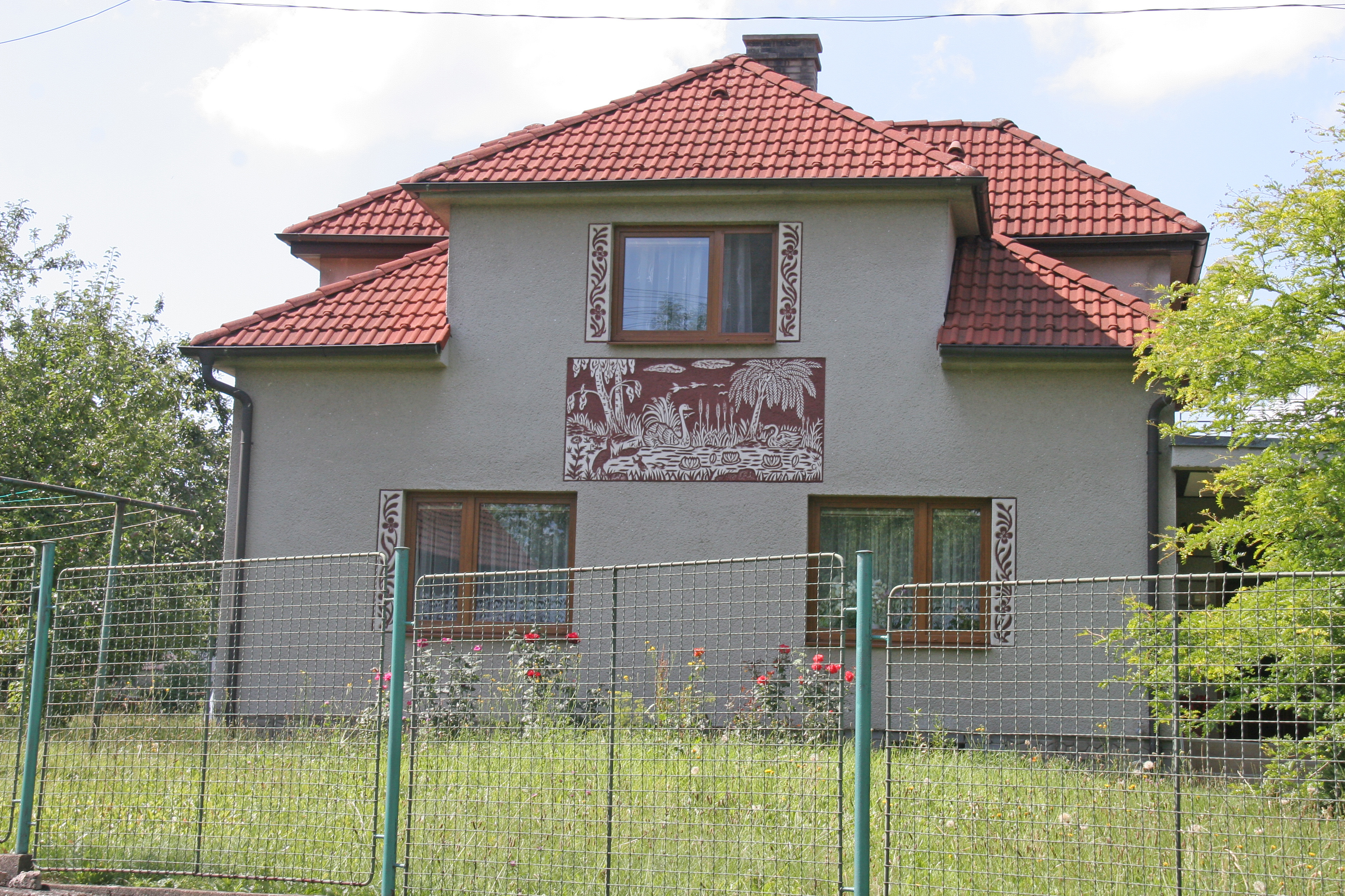 Žďárec u Seče čp. 37